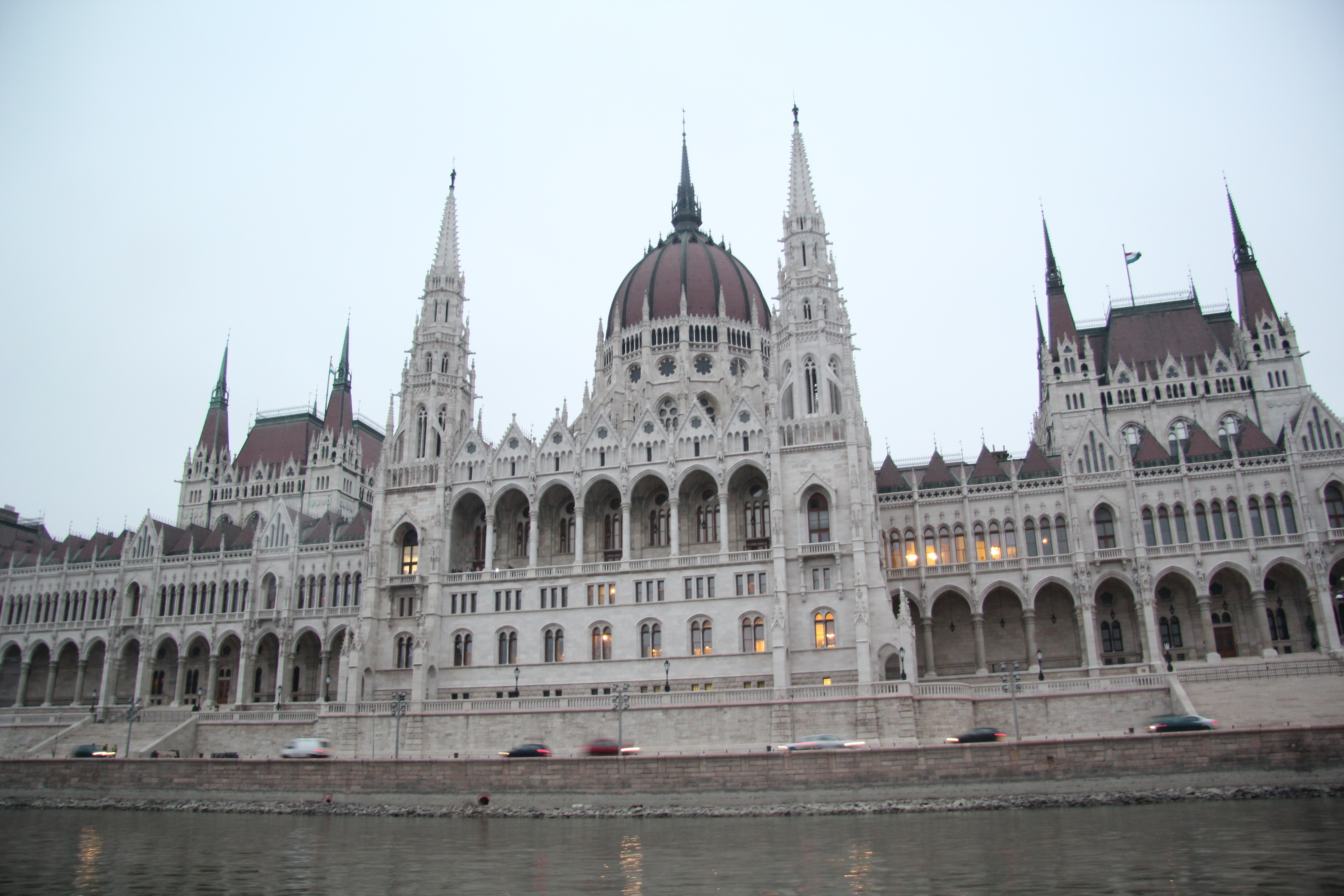 Parlamentsgebäude in Budapest am Abend This is a photo of a monument in Hungary, Identifier: 509